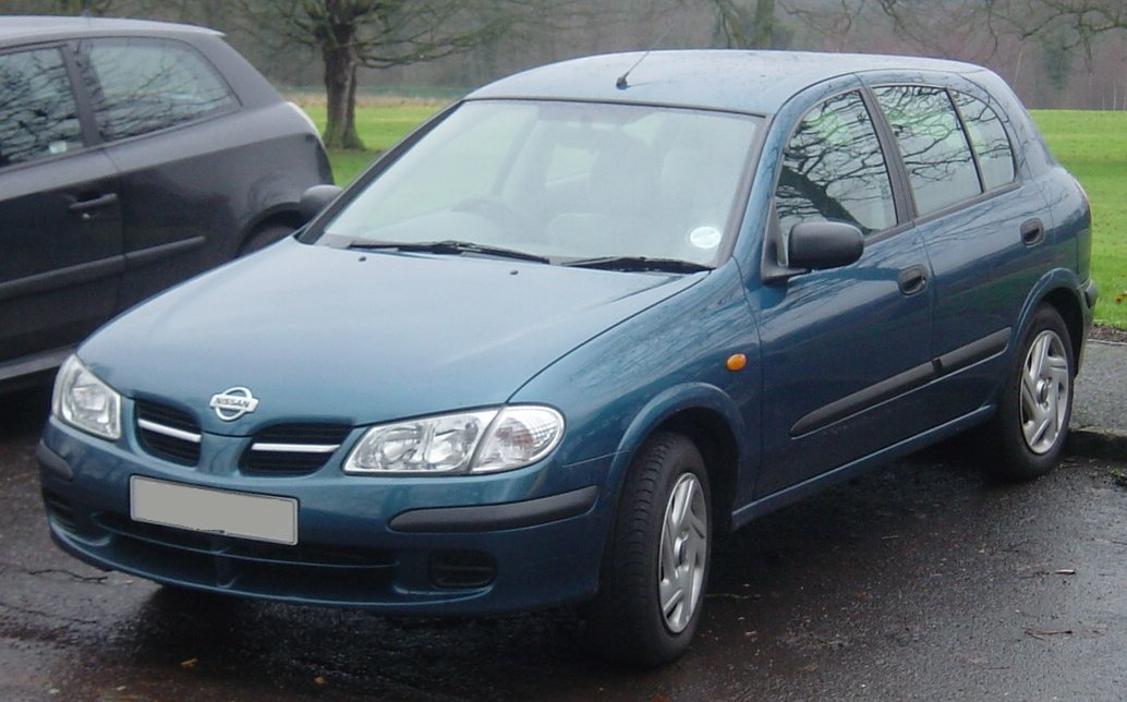 taken by Mazurka